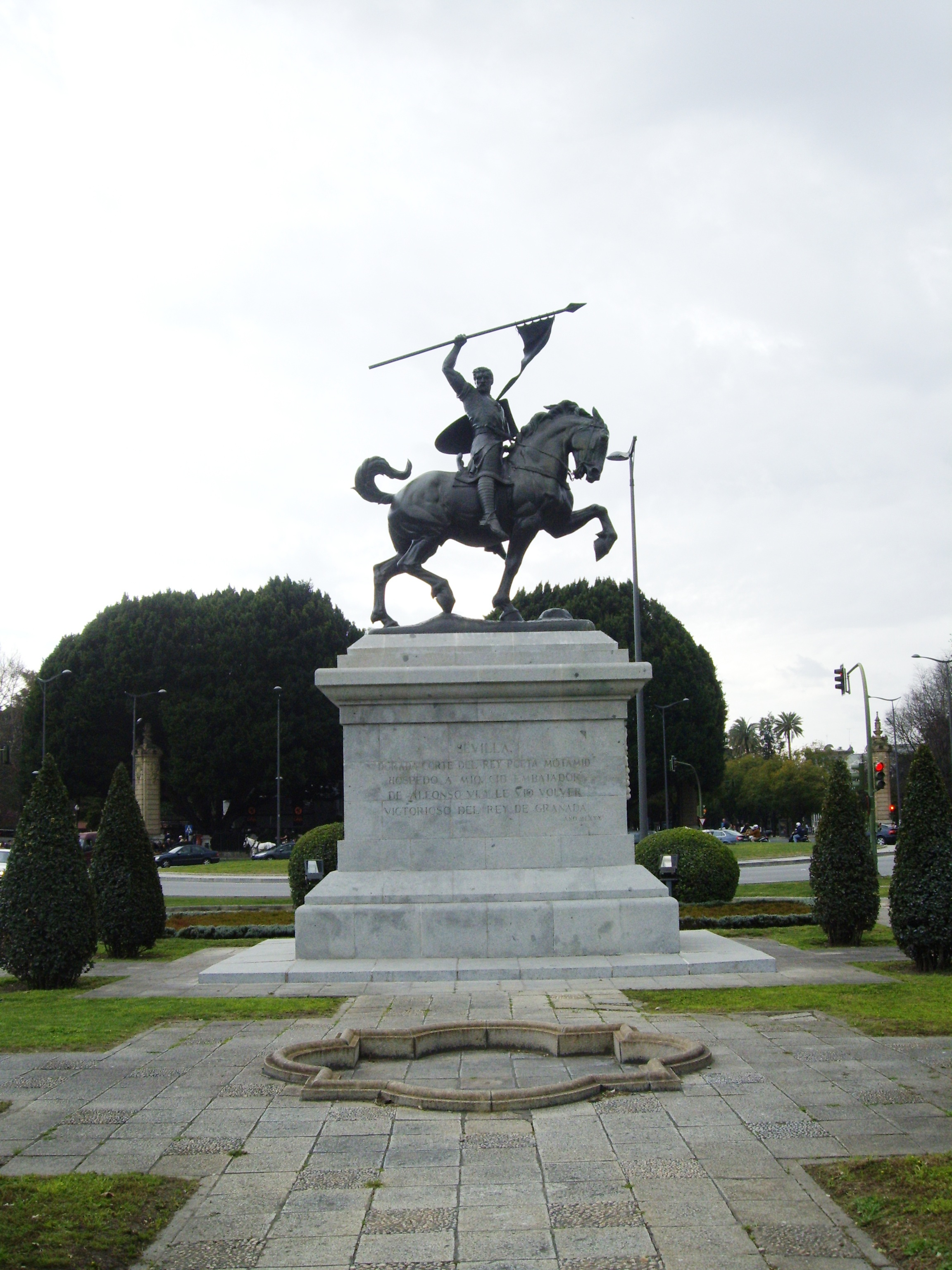 Estatua del cid de Sevilla realizada en 1927 e instalada en su basamento en 1929 para la Exposición Iberoamericana de 1929 de Sevilla